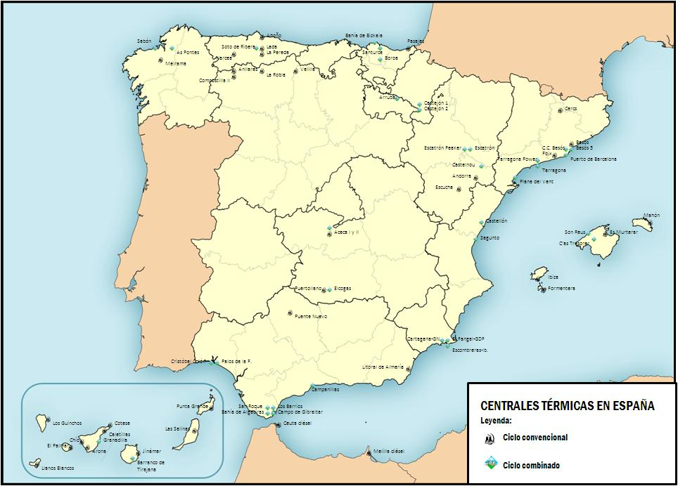 Mapa de distribución de las centrales térmicas activas en España en 2012. Referencias: mapa de Red Eléctrica de España